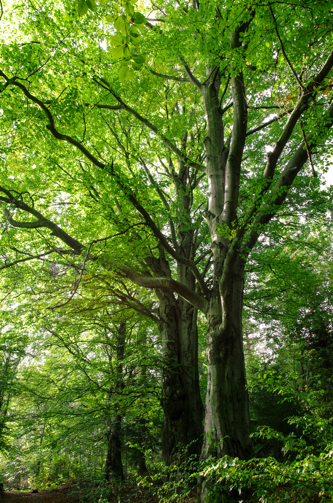 Památné stromy - Buková alej v ulici Pod Lesem, Nejdek okres Karlovy Vary